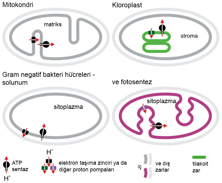 Kemiosmotik proton transferinin mitokondri, kloroplast ve bakteri hücrelerindeki yönleri